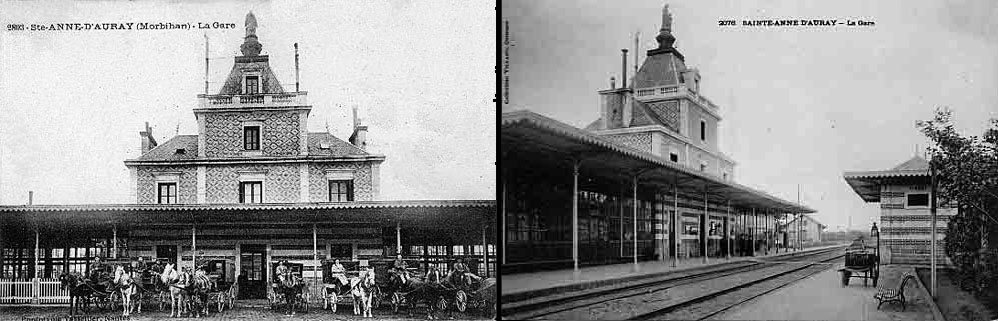 La gare Sainte-Anne à Pluneret dans le Morbihan au début du XXe siècle. Elle est l'une des rares gares à être coiffée d'une statue religieuse. sa situation proche du sanctuaire de Sainte-Anne d'Auray est la raison de cette particularitée.